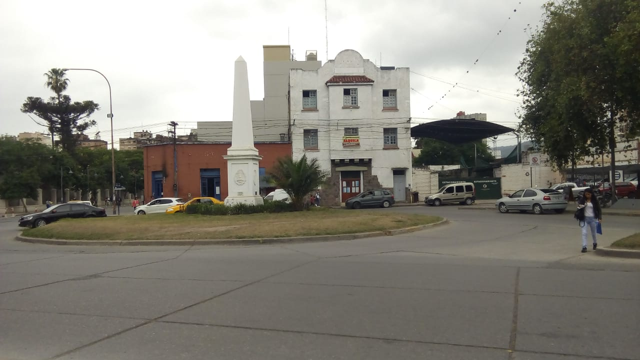 Recuerda la gesta heroica del pueblo de Jujuy, en la lucha por la independencia de la corona española.